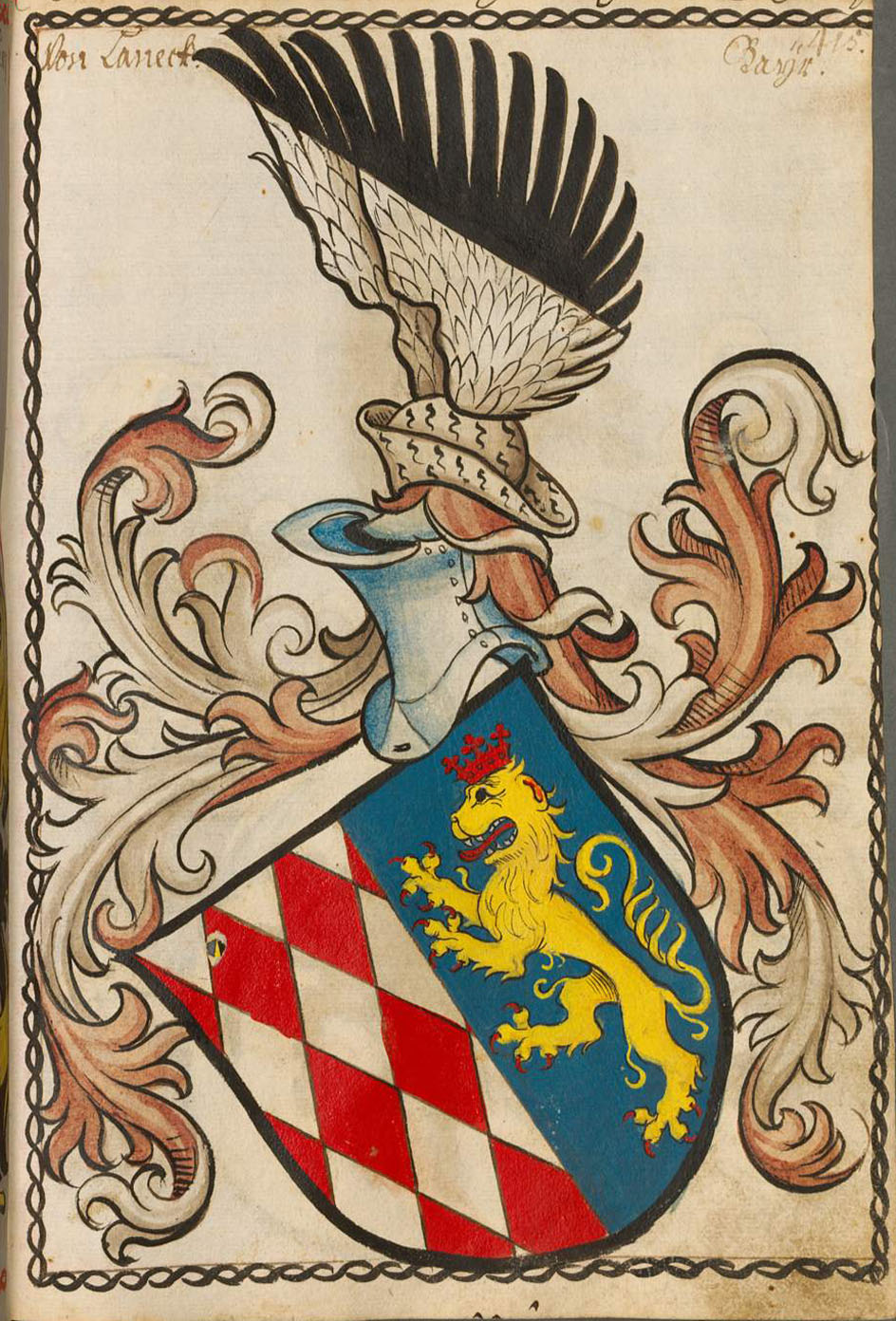 Scheibler'sches Wappenbuch , älterer Teil Bayern Seite 415